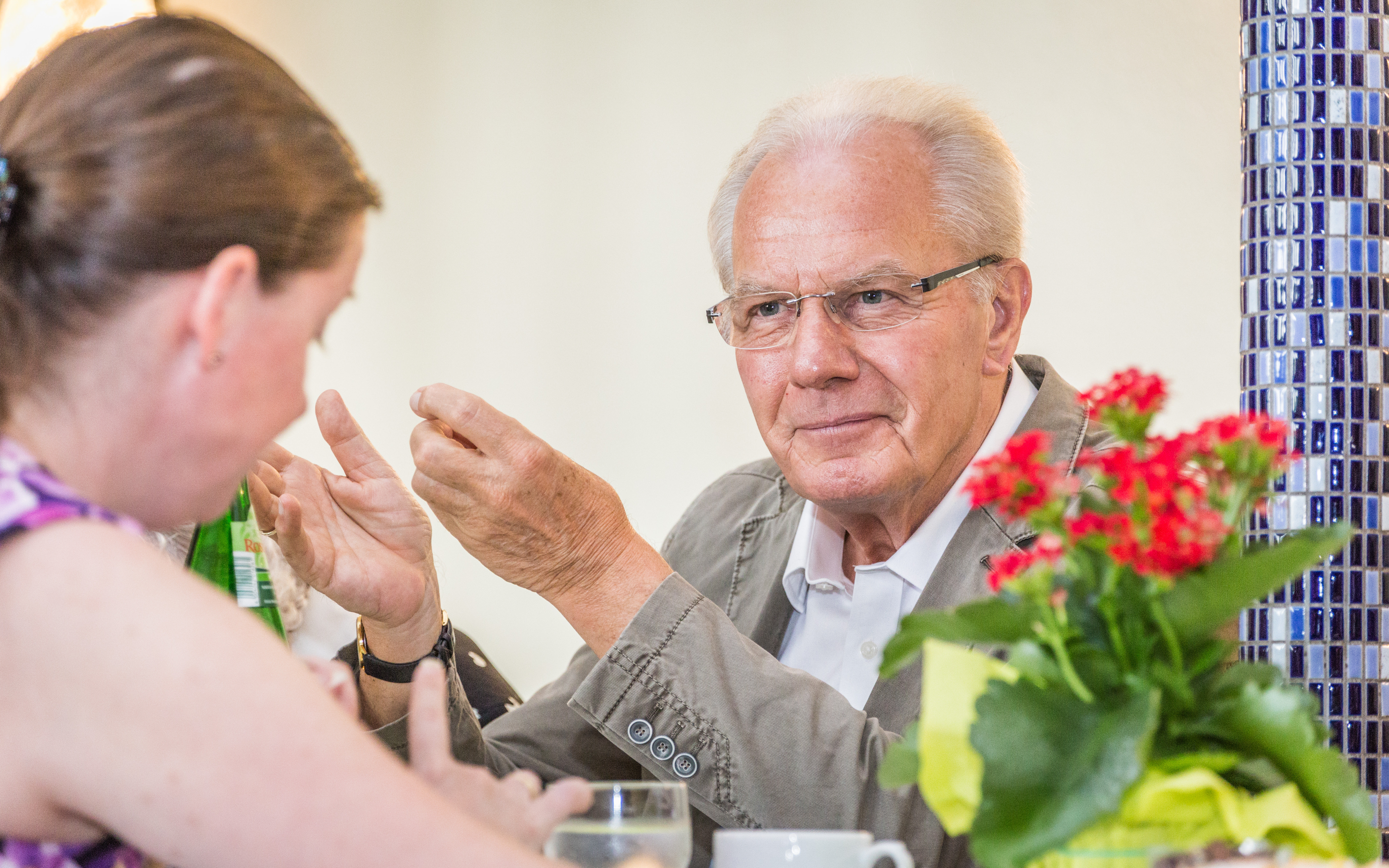 Bürgermeister Herbert Hunkel während der Maiveranstaltung des VdK im Gemeindezentrum der katholischen St. Josef Gemeinde in Neu-Isenburg.